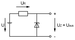 Z-Diode mit Vorwiderstand